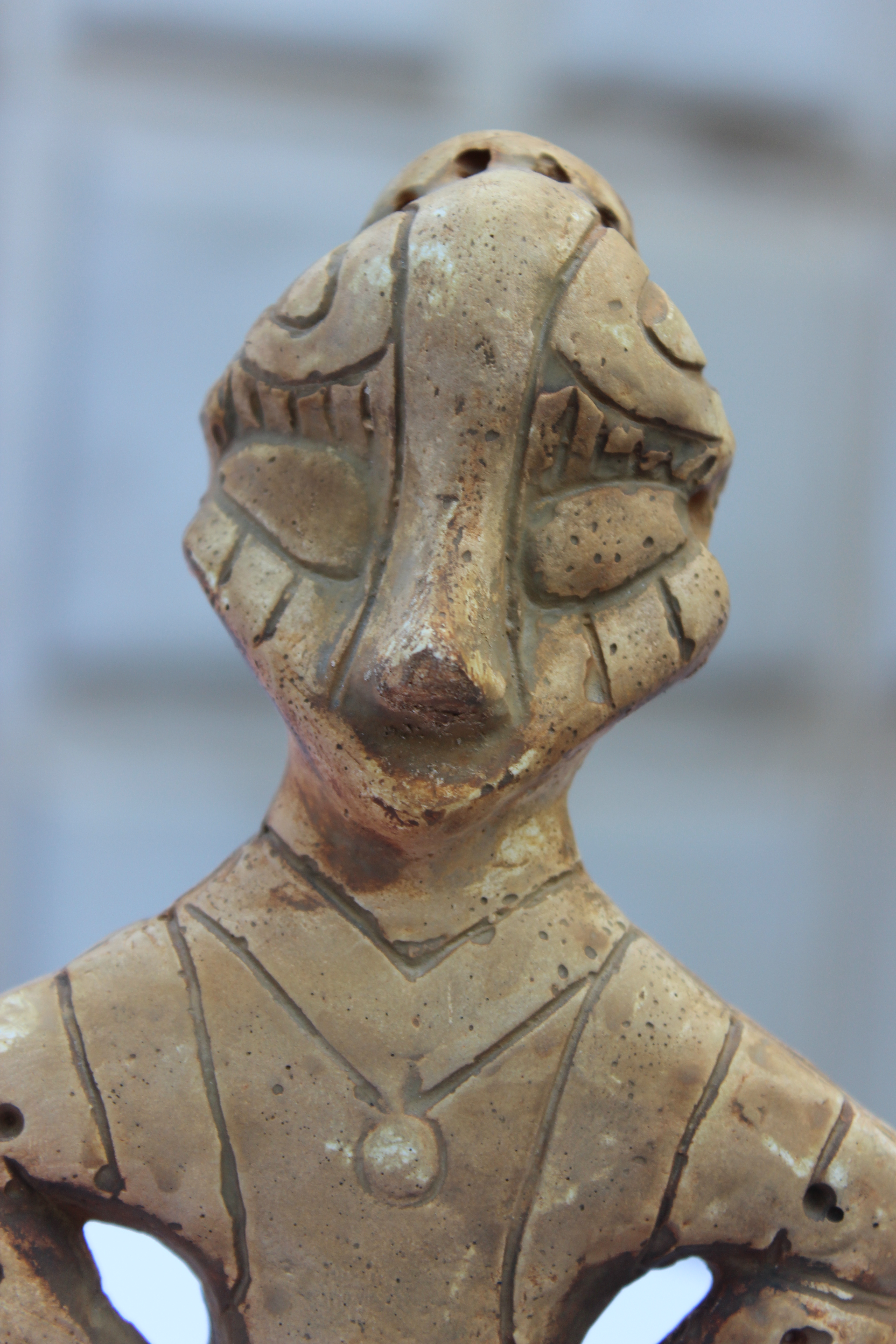 Figurinë antropomorfe e tipit “Hyjnësha e ulur në fron”